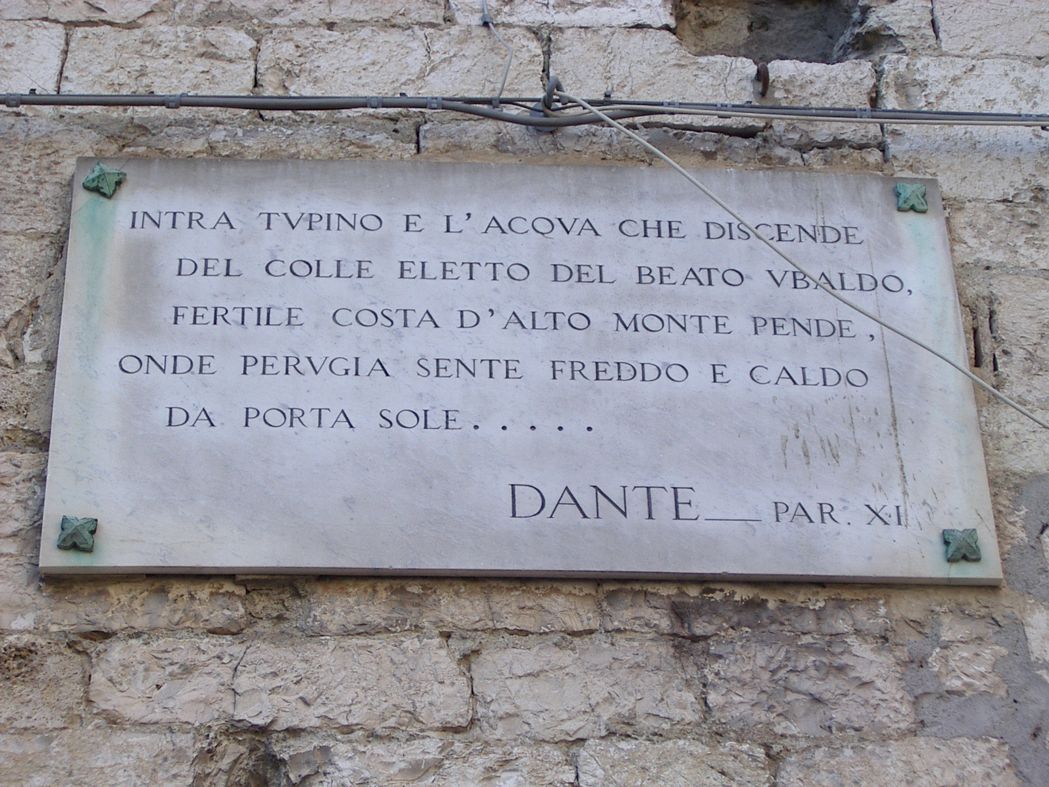 Plaque Porta del Sole - Inscription Dante- Pérouse-Ombrie